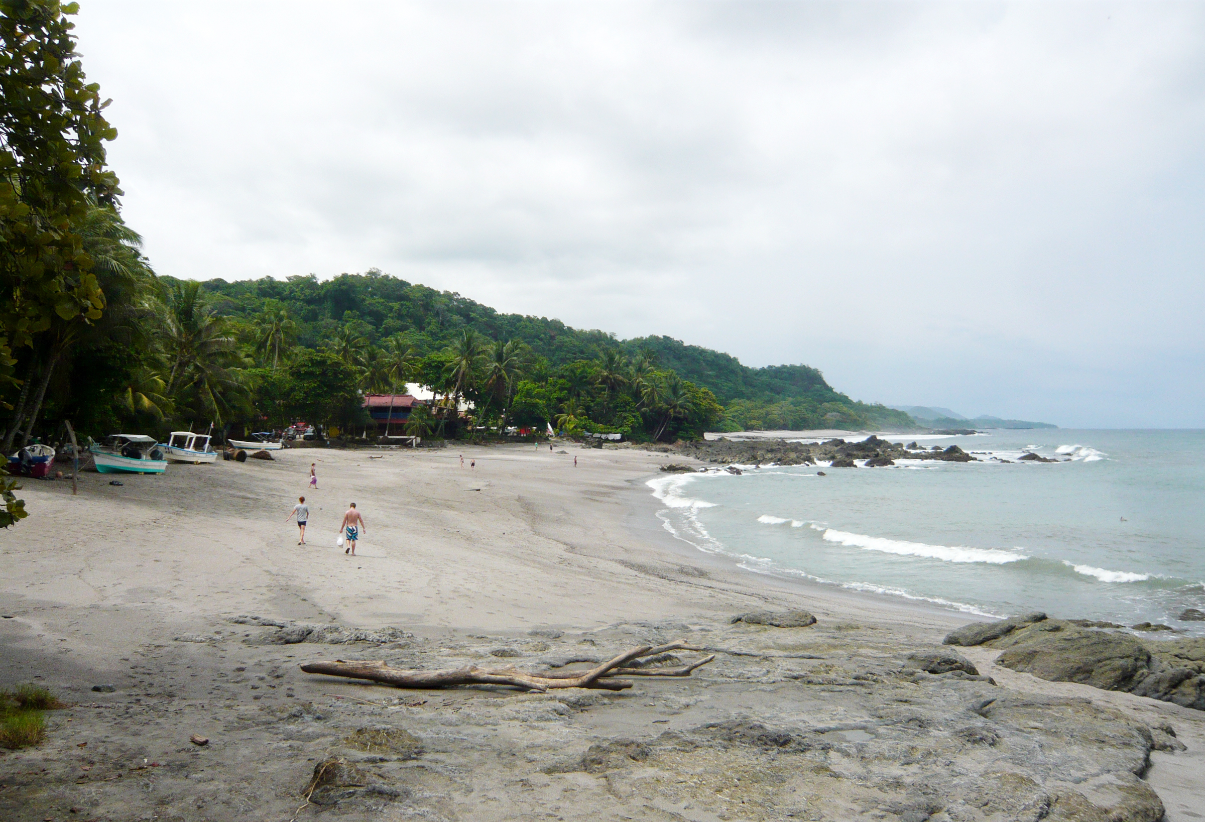 Montezuma i Costa Rica